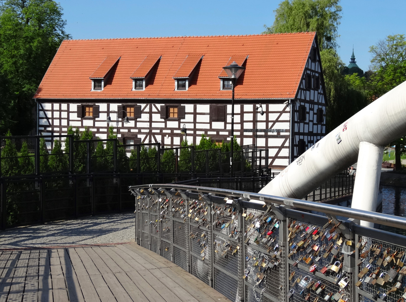 Kładka dla pieszych łącząca Wyspę Młyńską z Operą Nova i bulwarami nad Brdą